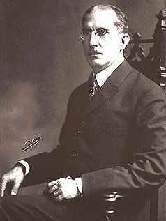 O presidente do Brasil Artur Bernardes (1922-1926).